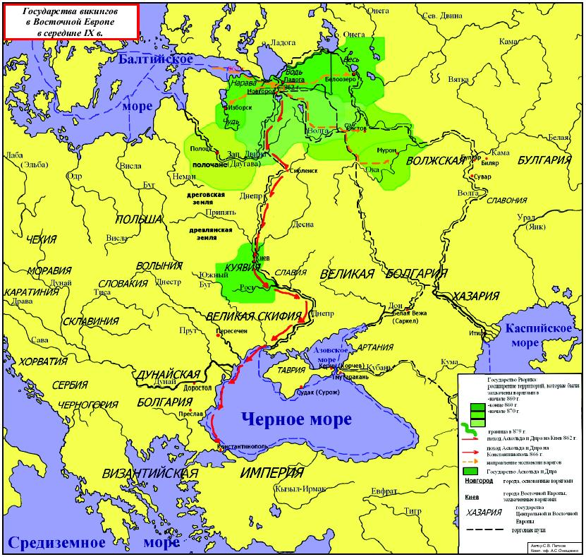 Русь во время правления Рюрика І.